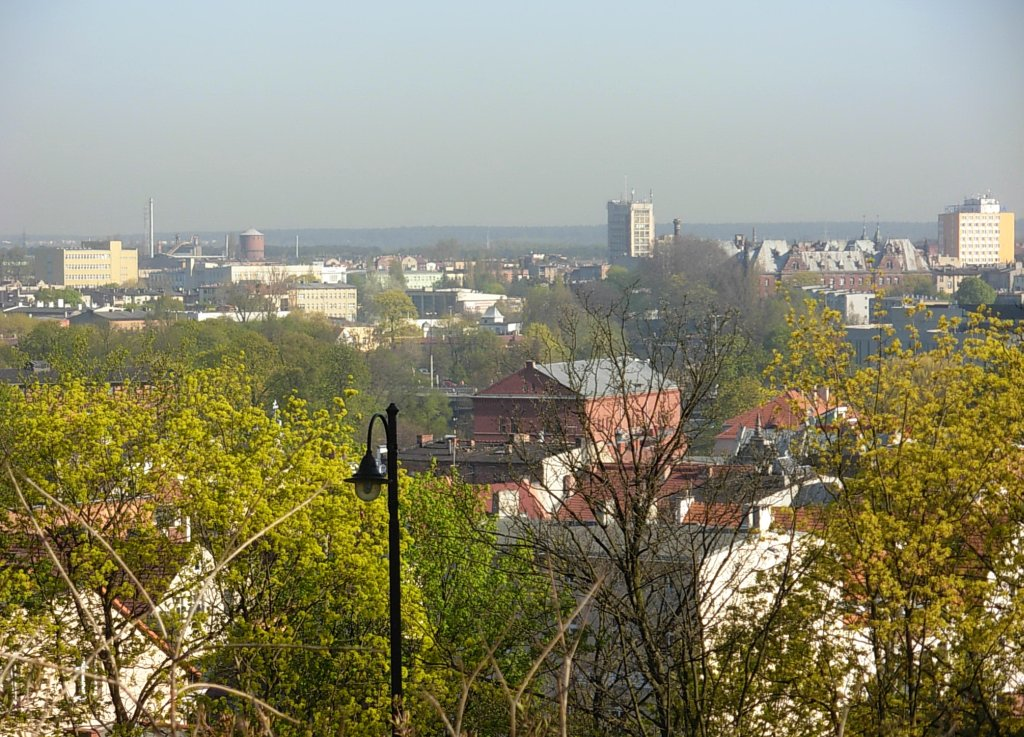 Widok z alei górskiej na Szwederowie w Bydgoszczy